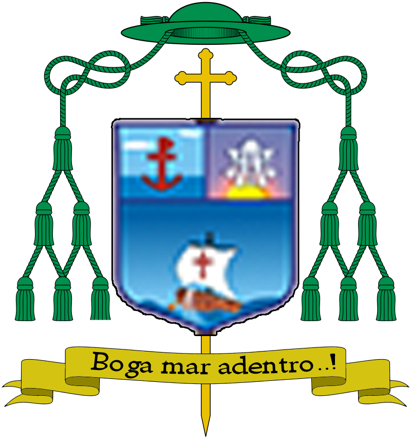 Escudo episcopal de Jaime José Villarroel Rodríguez